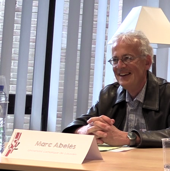 Marc Abélès lors d'une journée thématique organisée par la Chaire Pascal Lamy à Louvain-la-Neuve le 3 mai 2018.